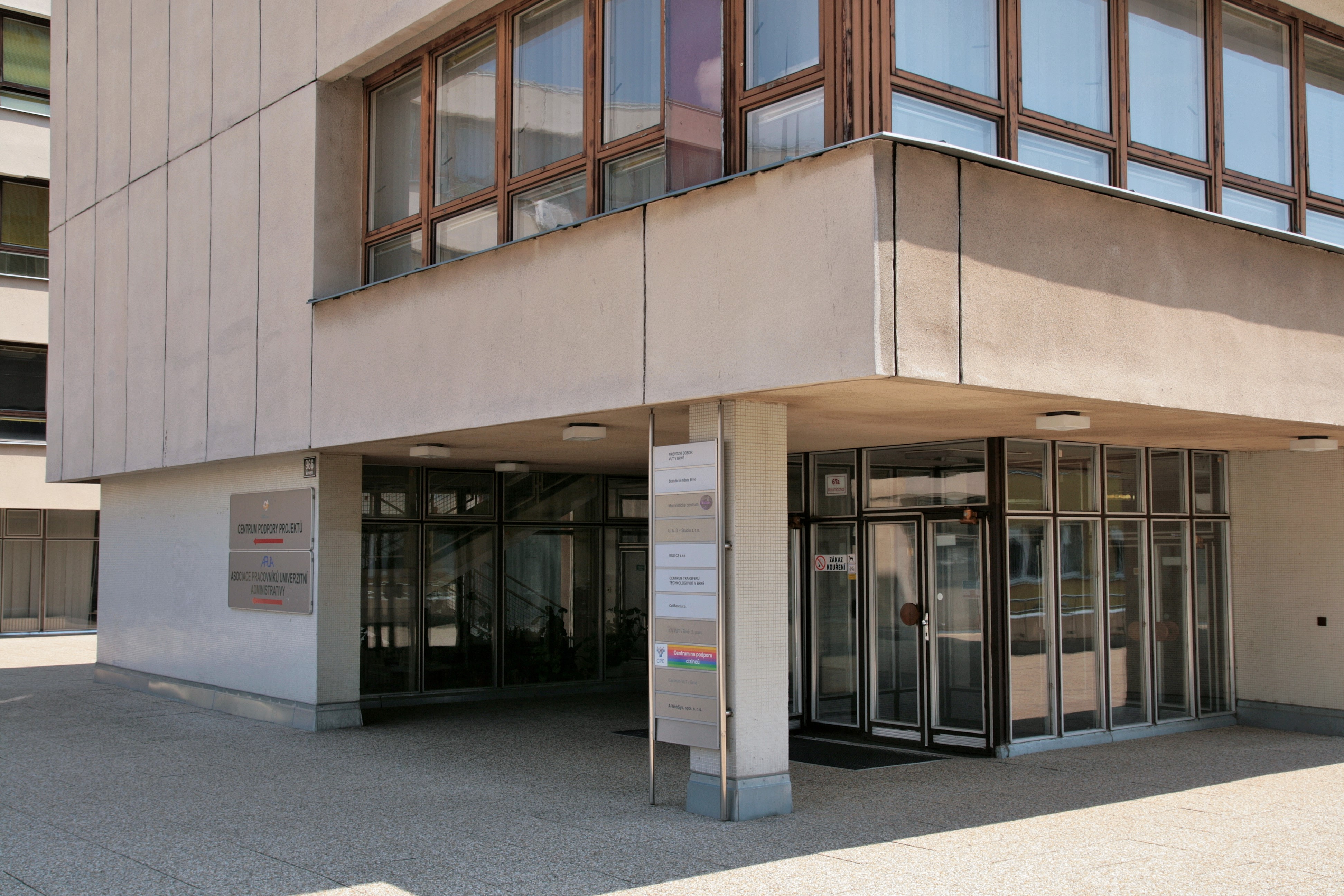 Budova Vysokého učení technického v Brně a dalších institucí na adrese Kounicova 966/67a, Brno. Vstup do budovy.